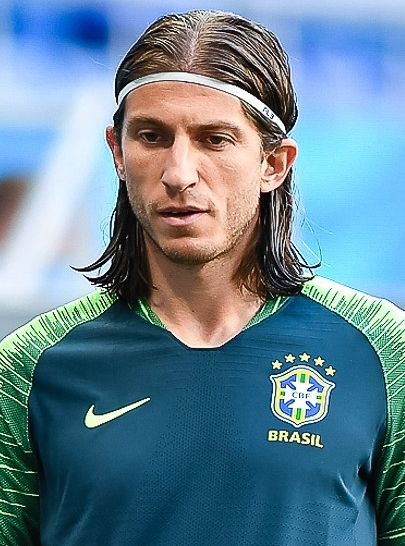 Бразилия и Швейцария готовятся к очной встрече на «Ростов Арене»